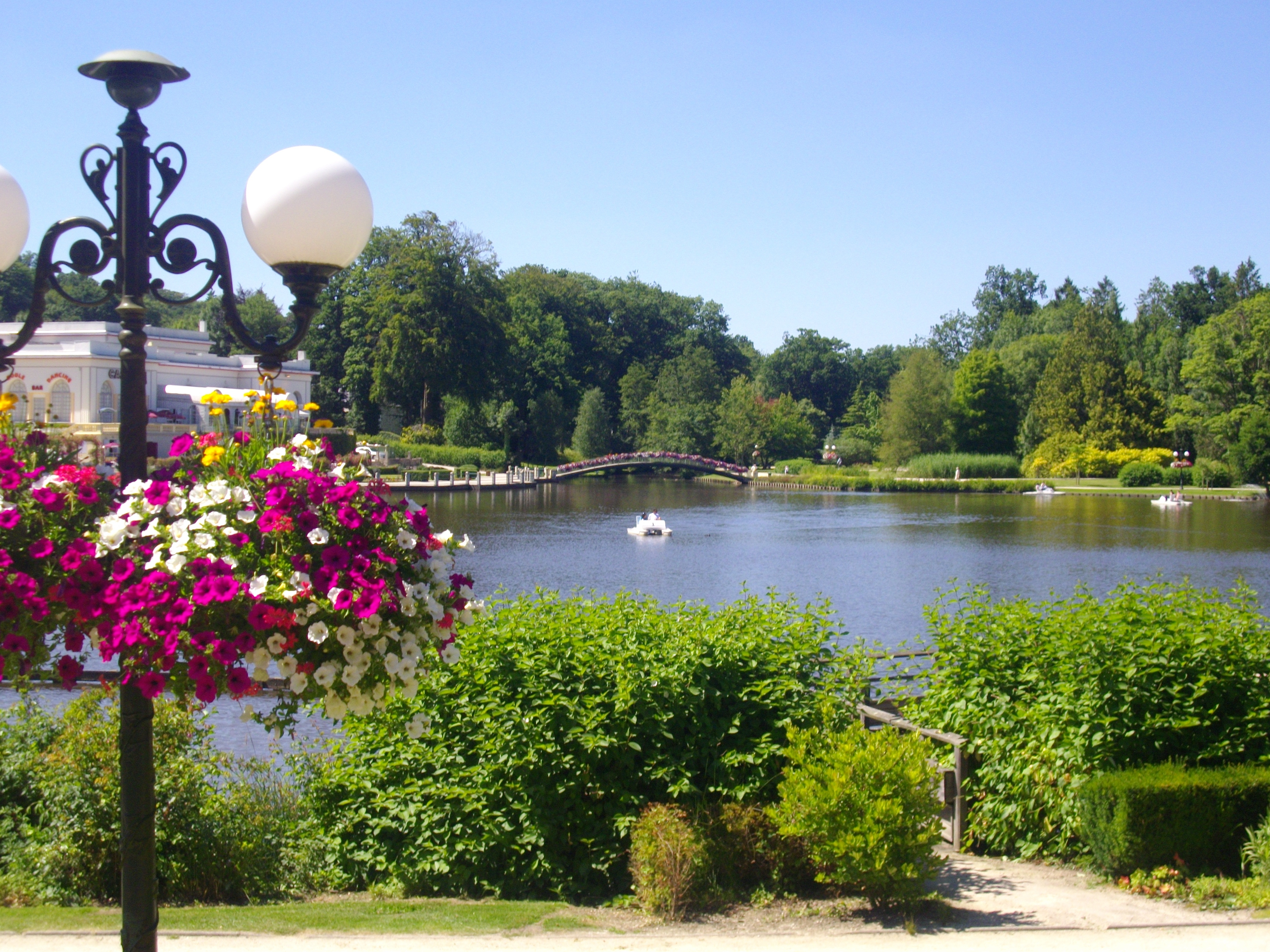 Lac de Bagnoles-de-l'Orne (Basse-Normandie, France)